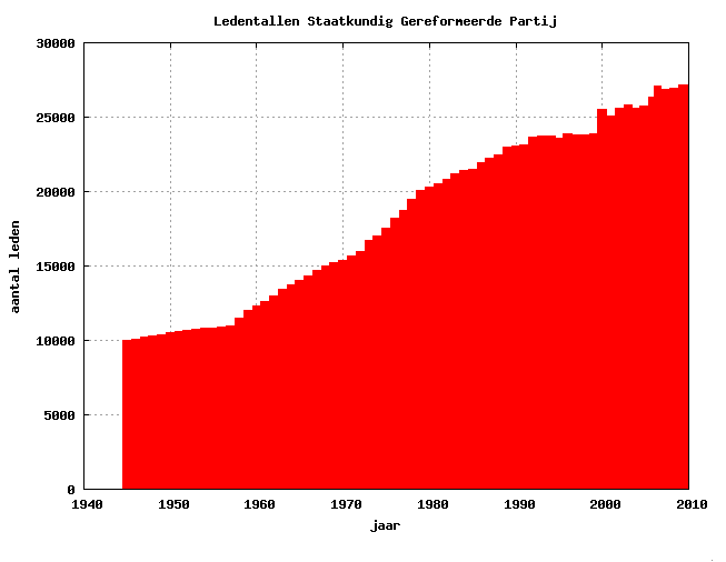 Ledenaantallen SGP 1940-2010